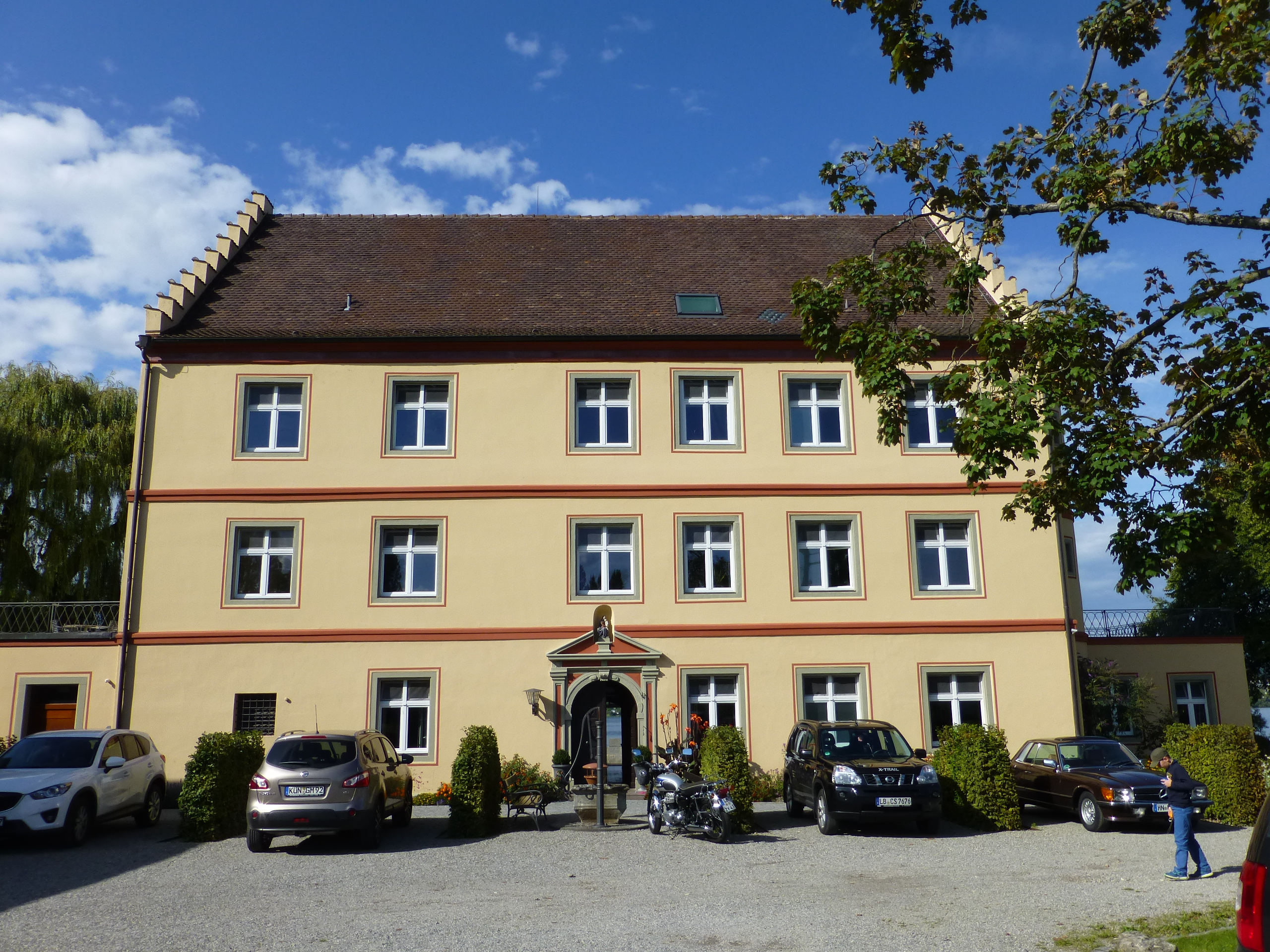 Eingang Schloss Windegg, Insel Reichenau